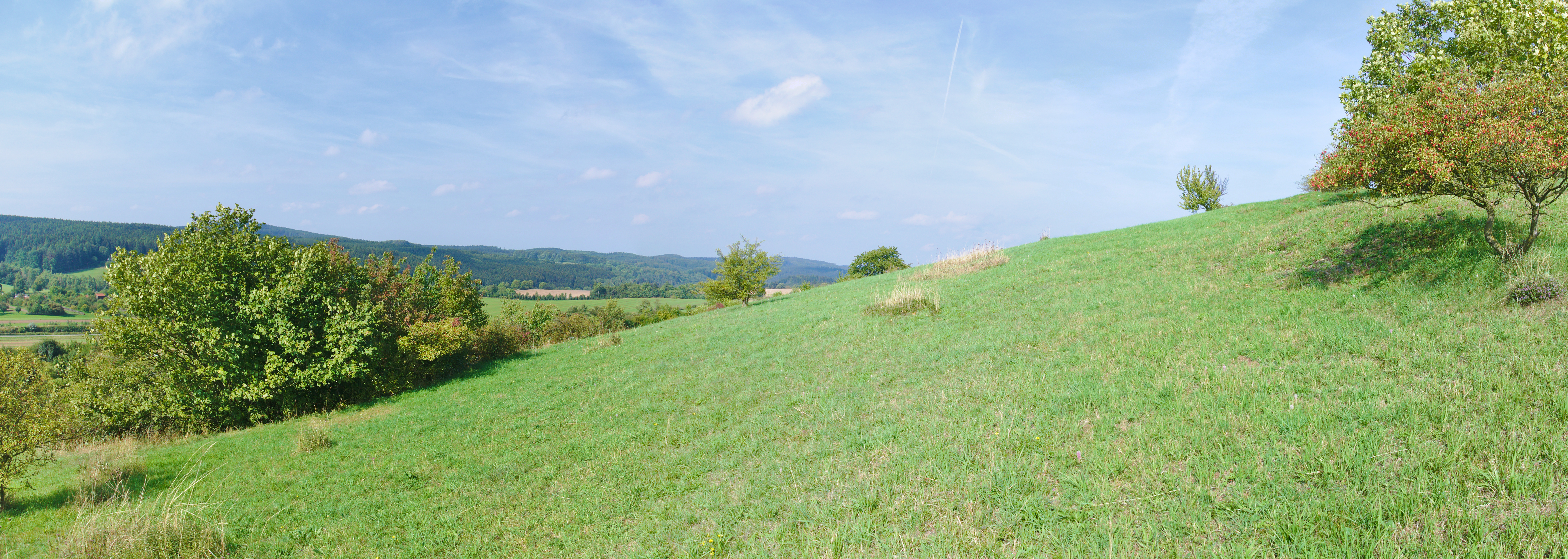 Přírodní památka Na Kozénku, Dzbel, okres Prostějov